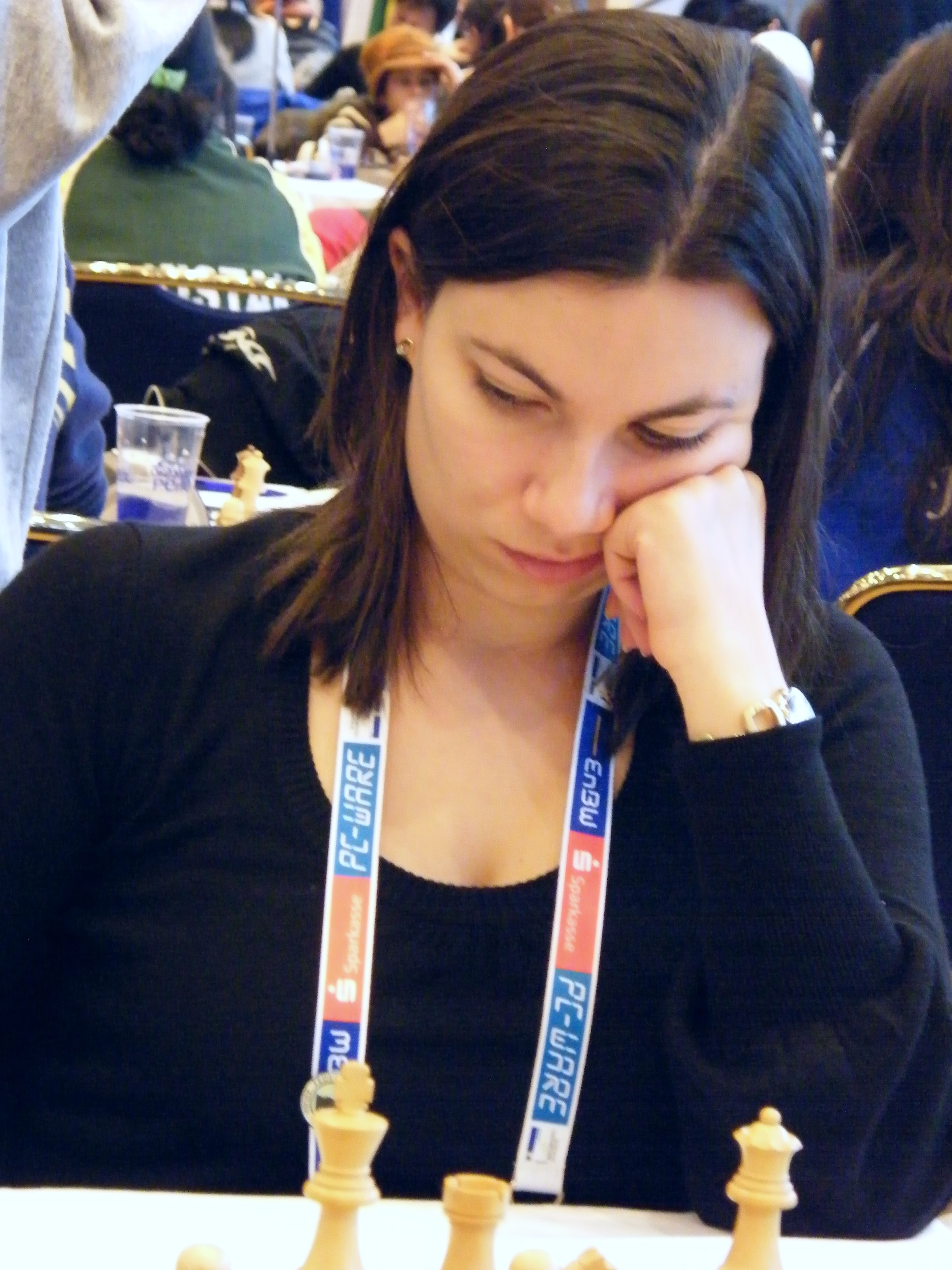 Oana Caruana Pulpan (geb. Pulpan) bei der 38. Schacholympiade in Dresden 2008